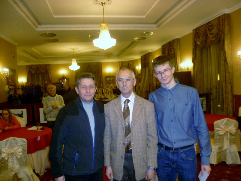 Vľavo Karol Lohay, vpravo Adam Kubica